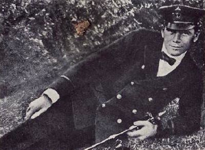 František Rasch (1889 - 1918), Český námořník a revolucionář.